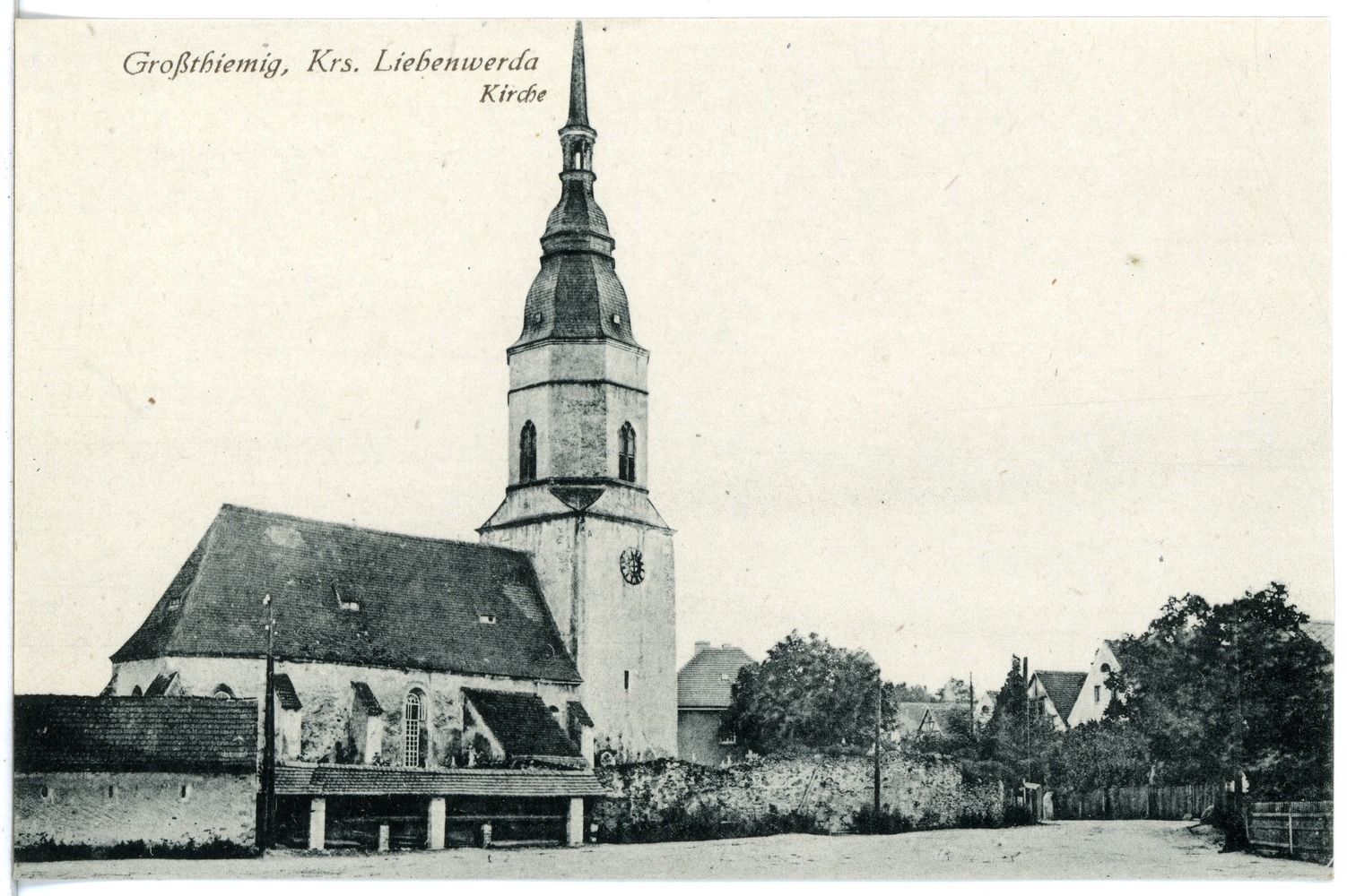 Großthiemig; Kirche This postcard is from publisher Brück & Sohn in Meißen ( postcard has a unique number 20250 and is available in a higher resolution at the publisher. This images was uploaded in a cooperation project between Wikipedians and the publisher.